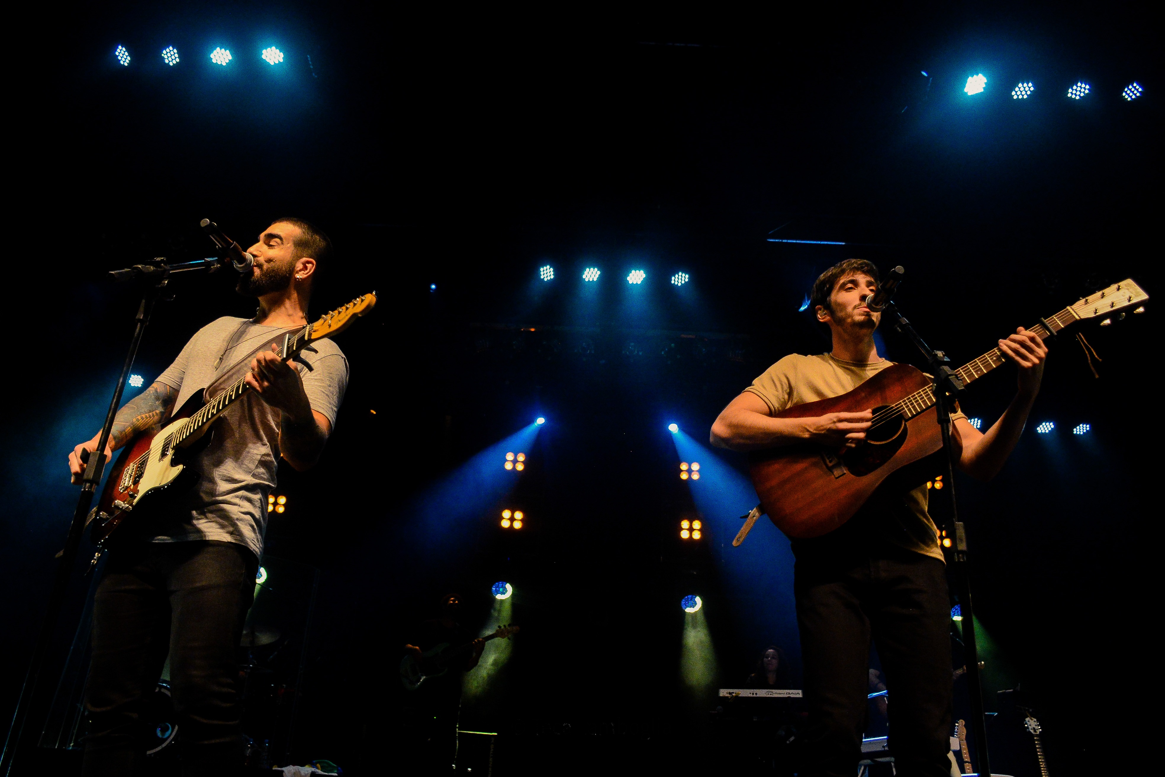 Duo OutroEu em participação no show do duo Anavitória em São Paulo, setembro de 2018.